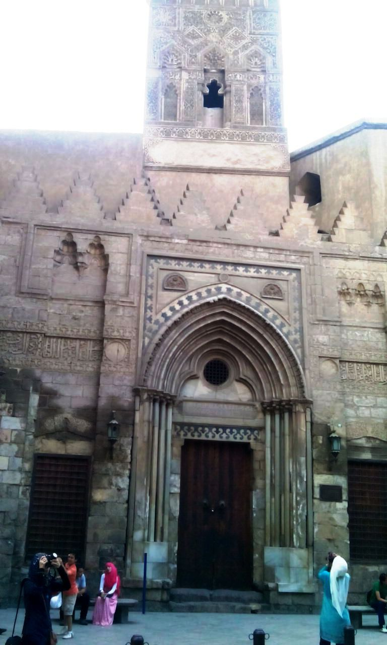 مدرسة وقبة السلطان الناصر محمد بن قلاوون بالقاهرة.